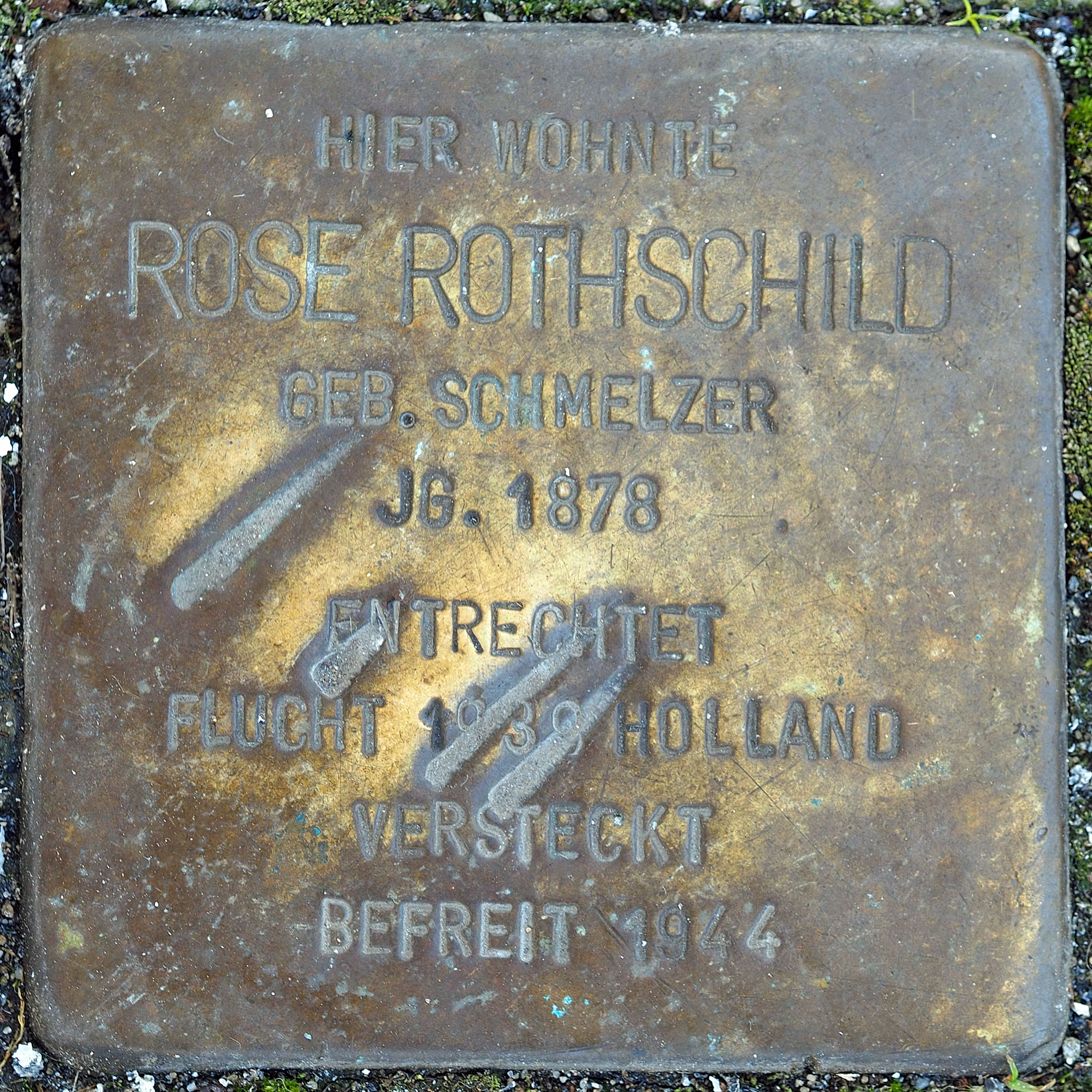 Stolperstein DU 293: Rothschild, Rose